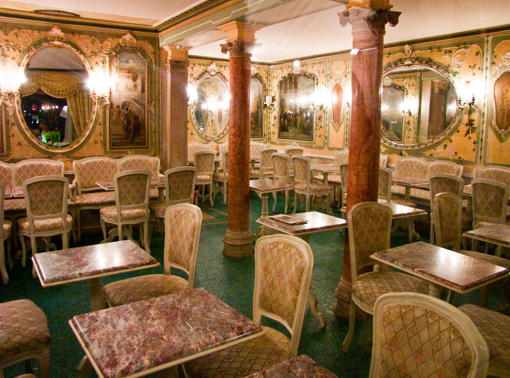 Caffè Quadri (San Marco), Venezia - Italia.